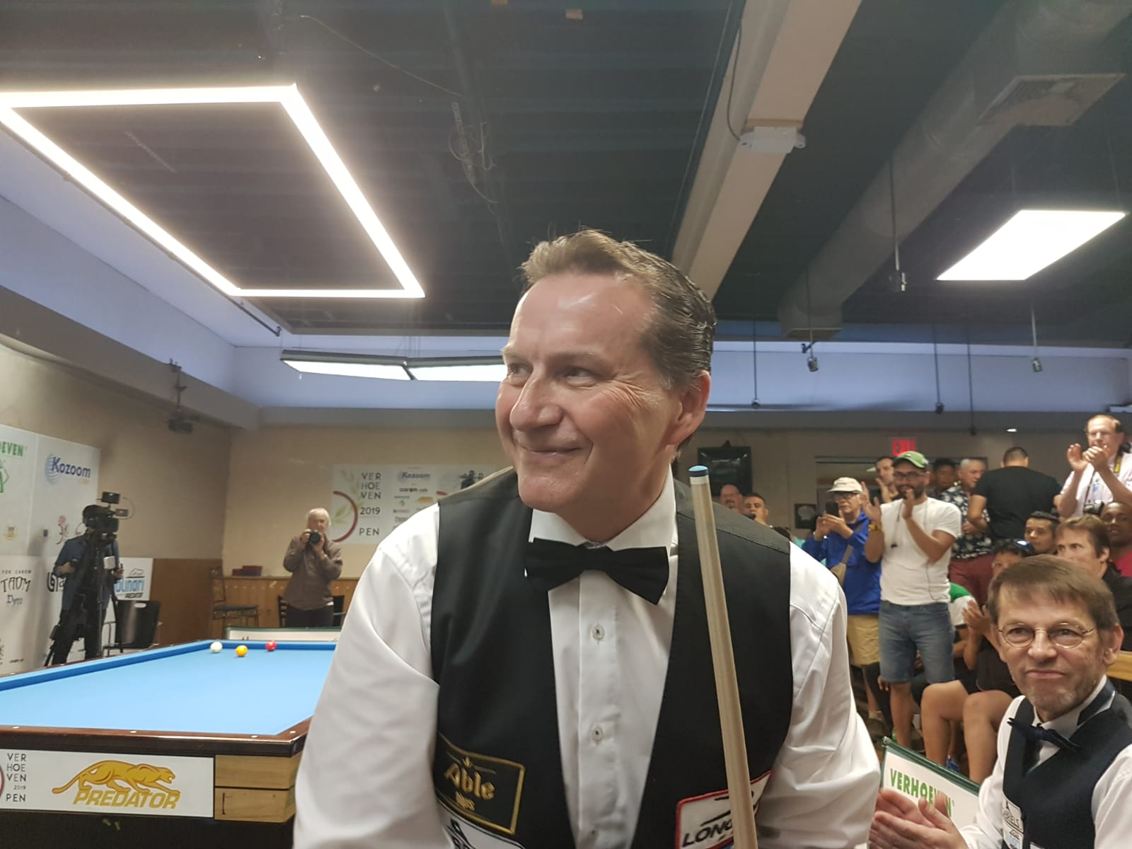 s. Dateiname